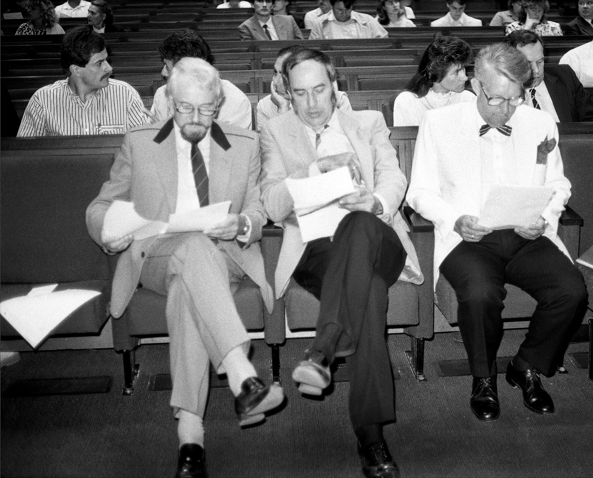 Hugo Hiibus, Ants Antson, Oleg Sapožnin Miss Estonia 88 žüriis